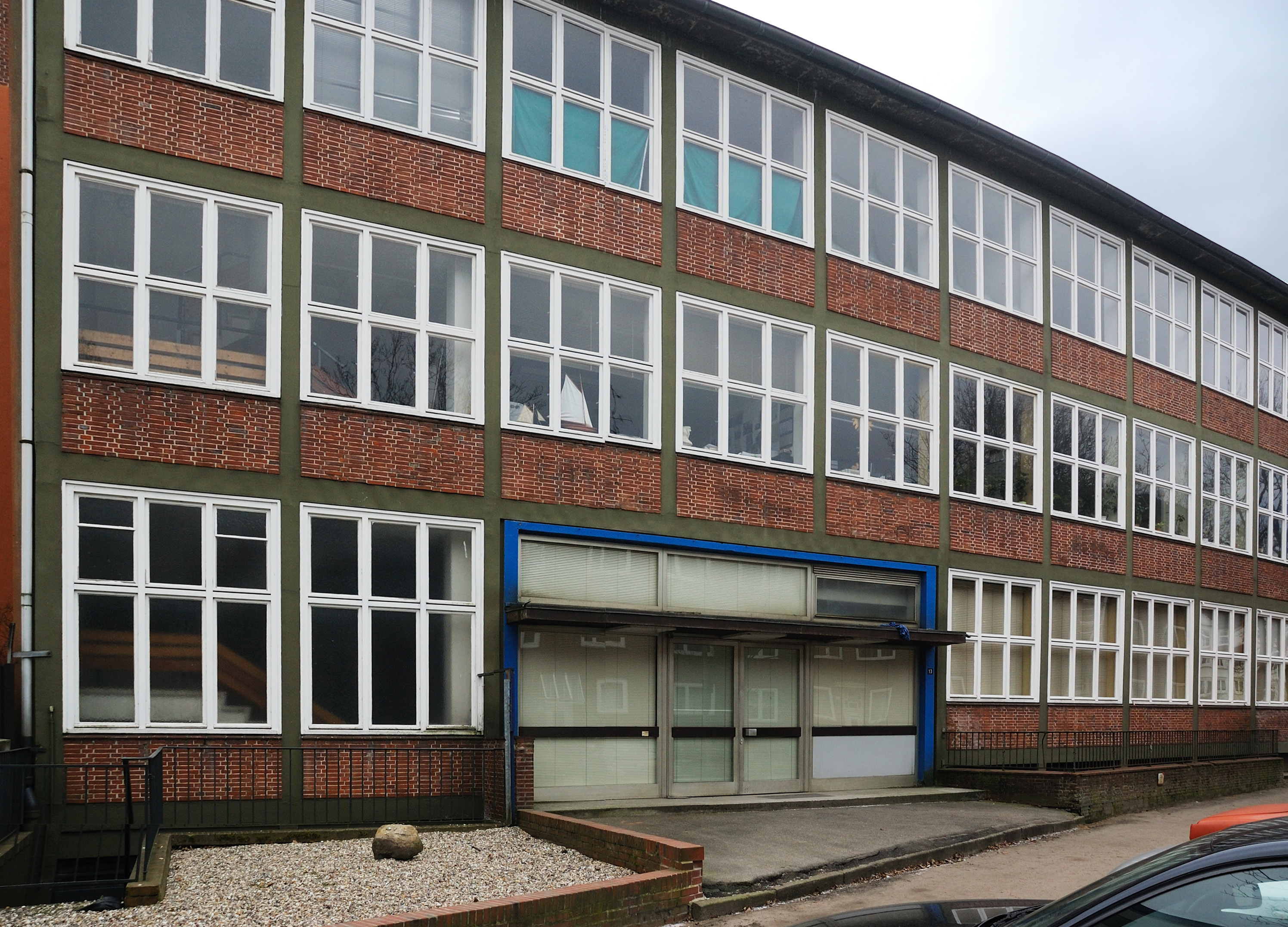 Ansicht 14. Revier im Großstadtrevier